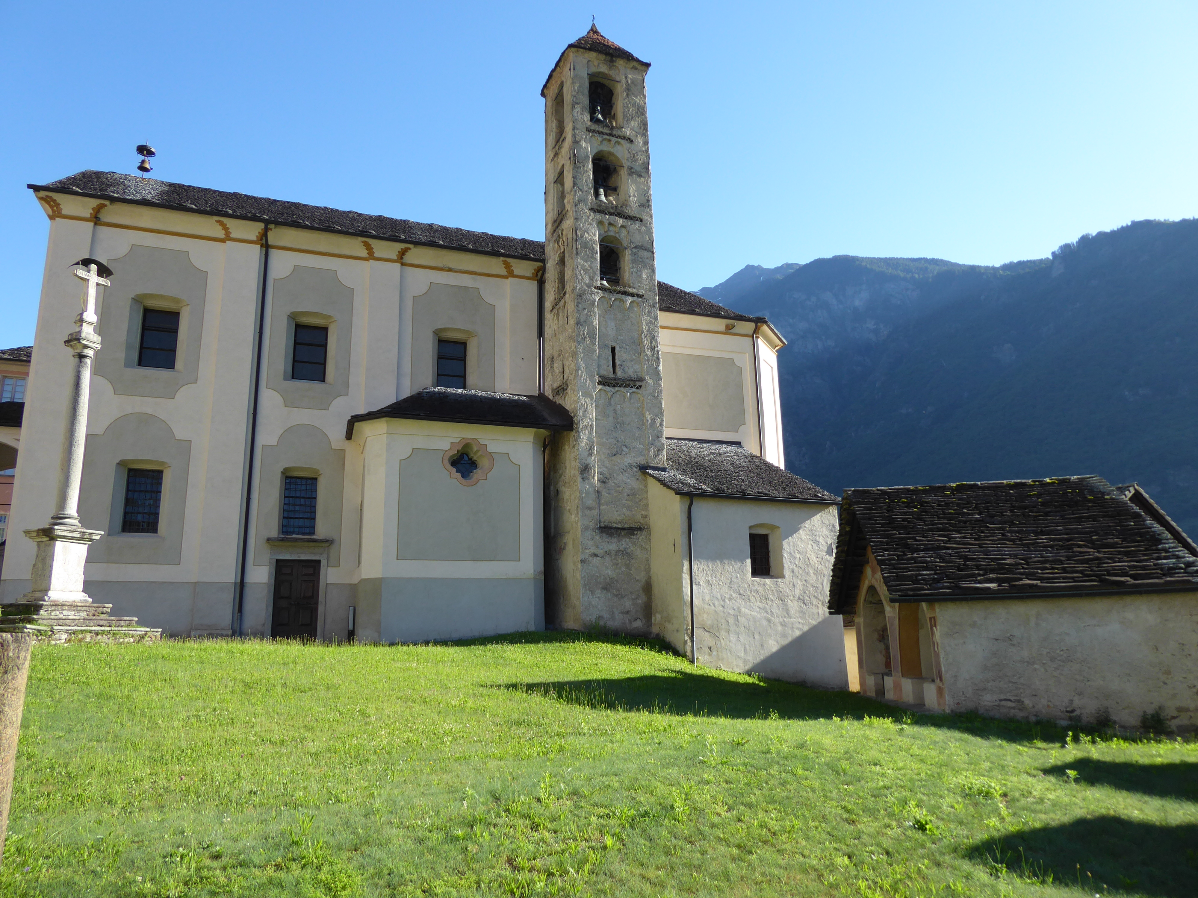 Santa Maria Assunta in Semione-Serravalle, Tessin, Schweiz.